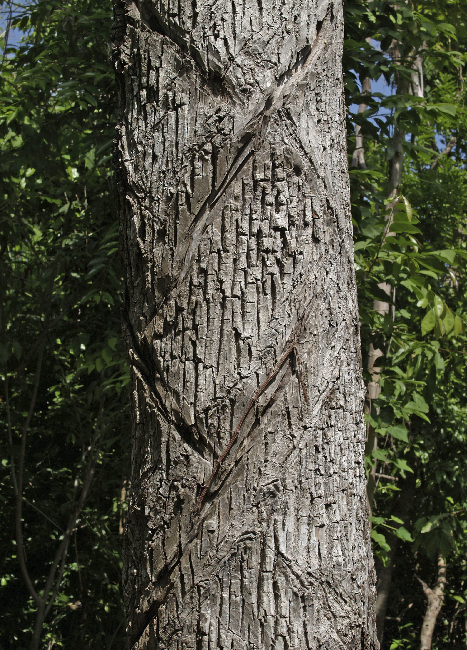 Manilkara zapota, corteza con incisiones. Árbol del chicle. Jardín Botánico «Dr. Alfredo Barrera Marín». Puerto Morelos, Quintana Roo, México.